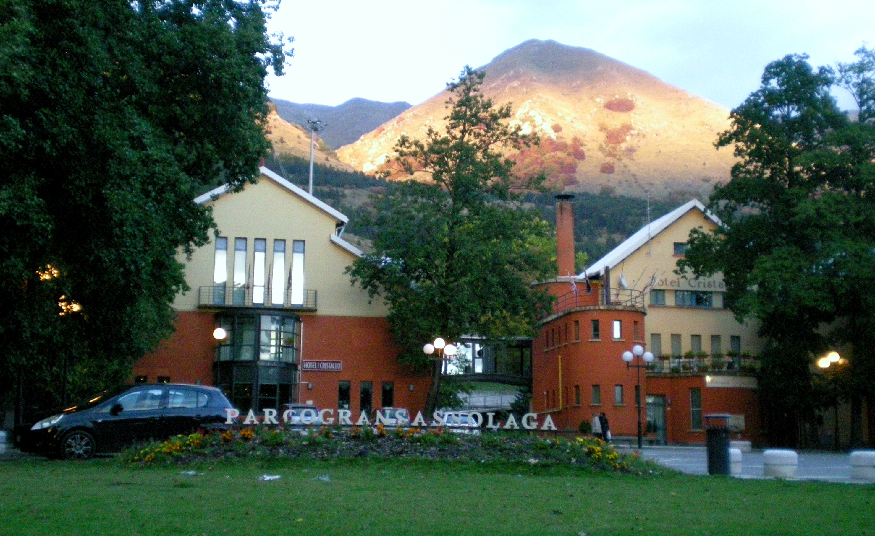 Fonte Cerreto (L'Aquila): base della funivia del gran Sasso d'Italia